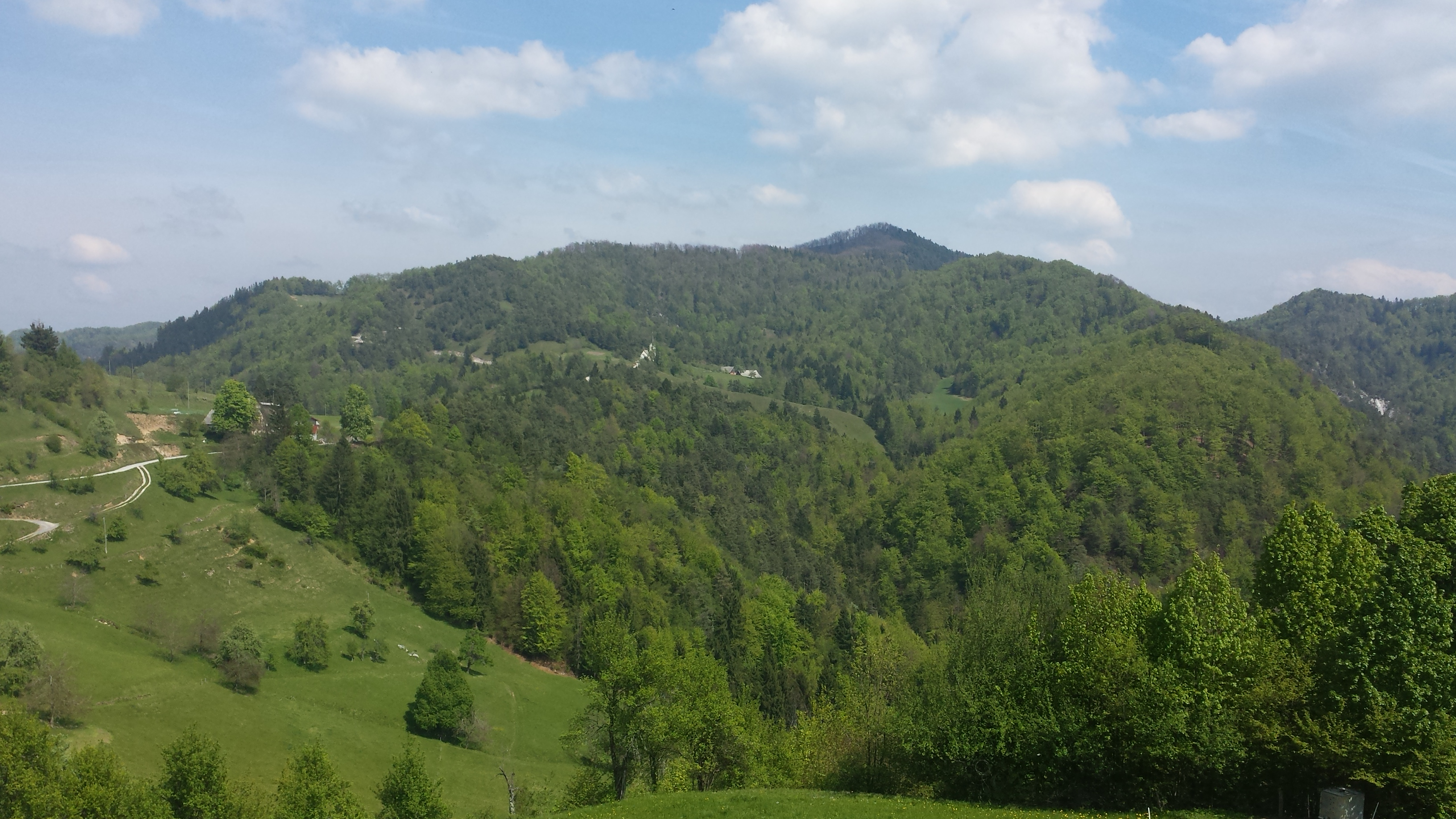 Tošč, posneto iz Sela nad Polhovim Gradcem